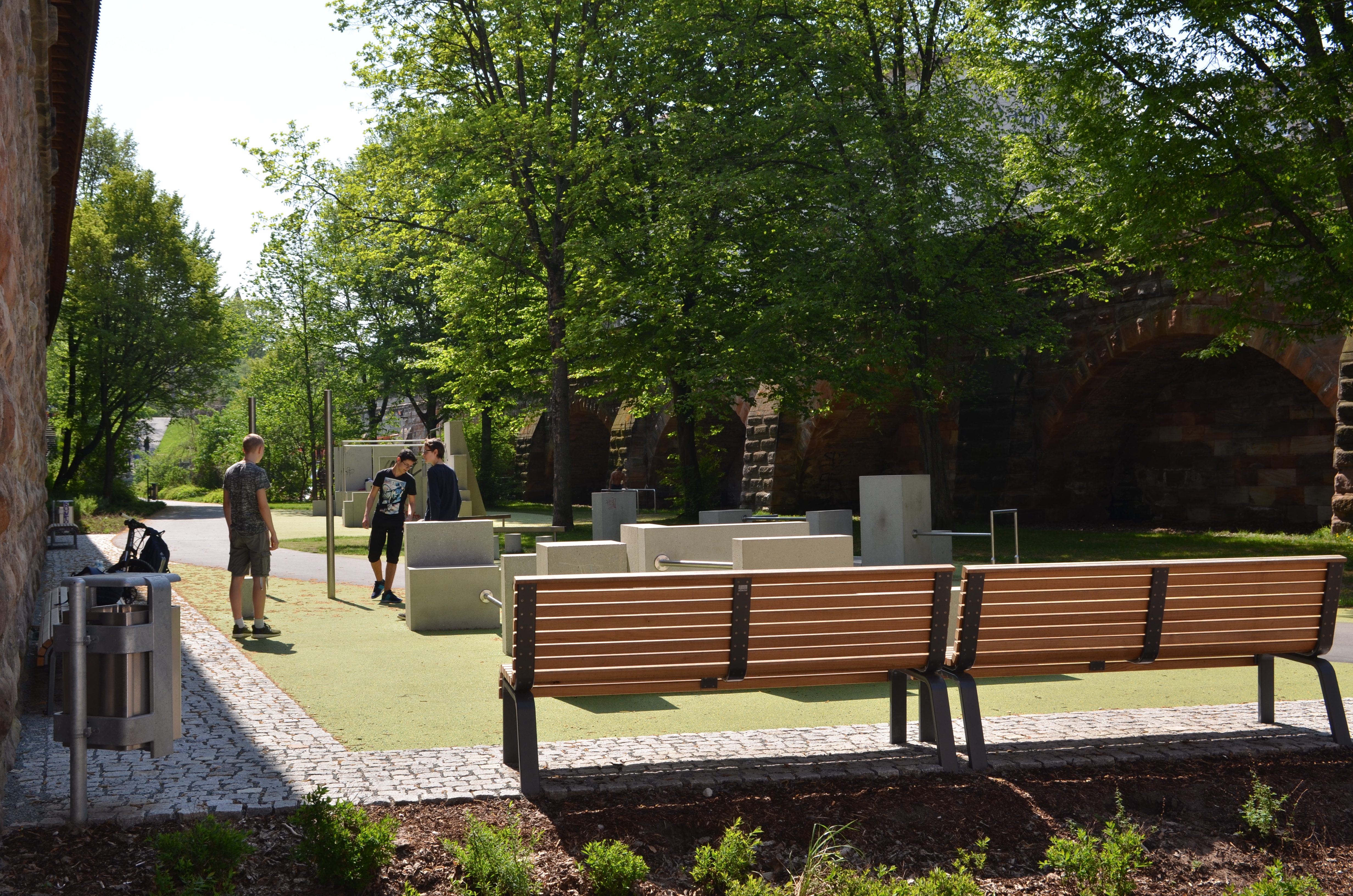 Parcours-Spielplatz für Jugendliche beim Kontumazgarten